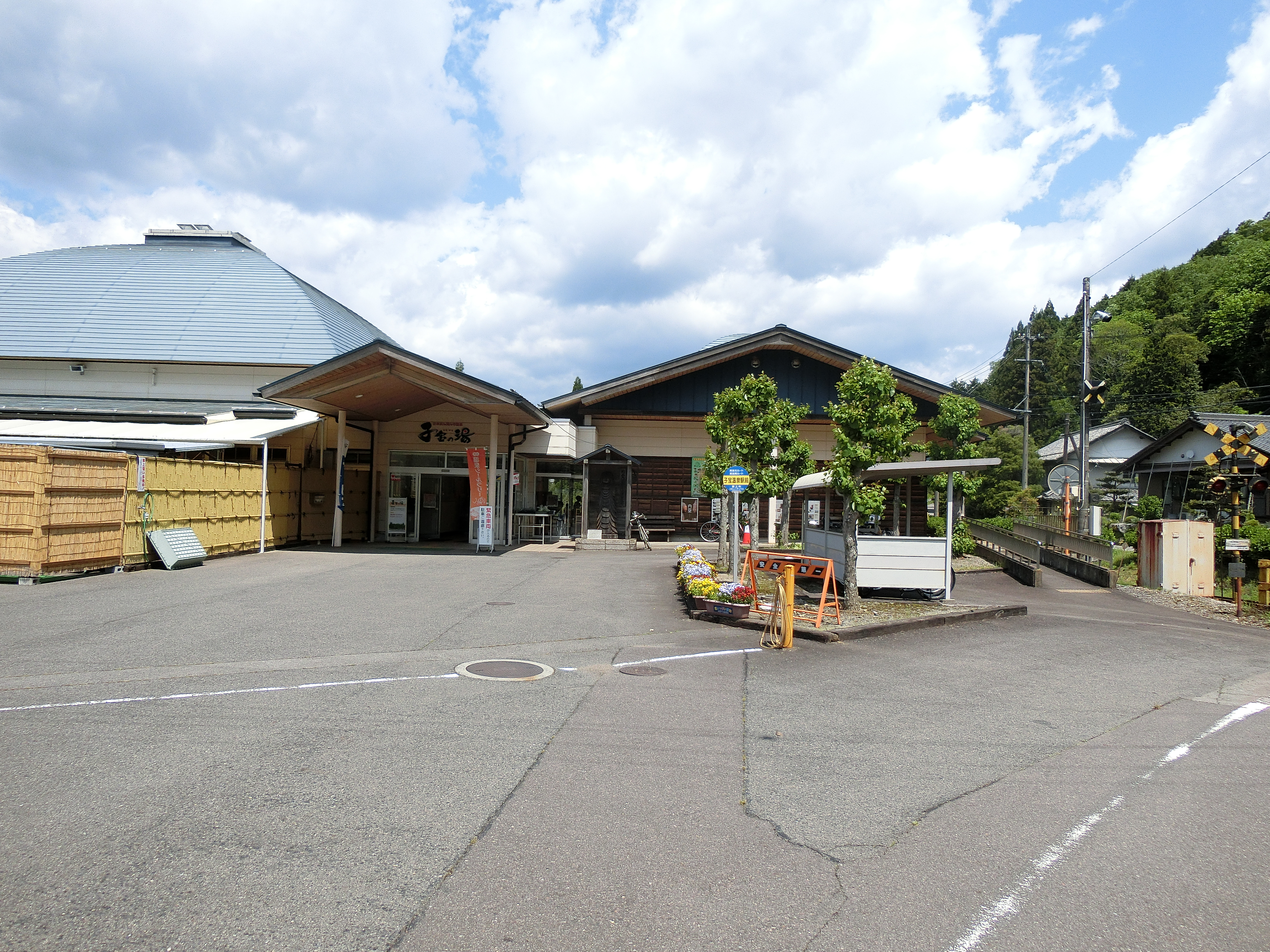 みなみ子宝温泉駅